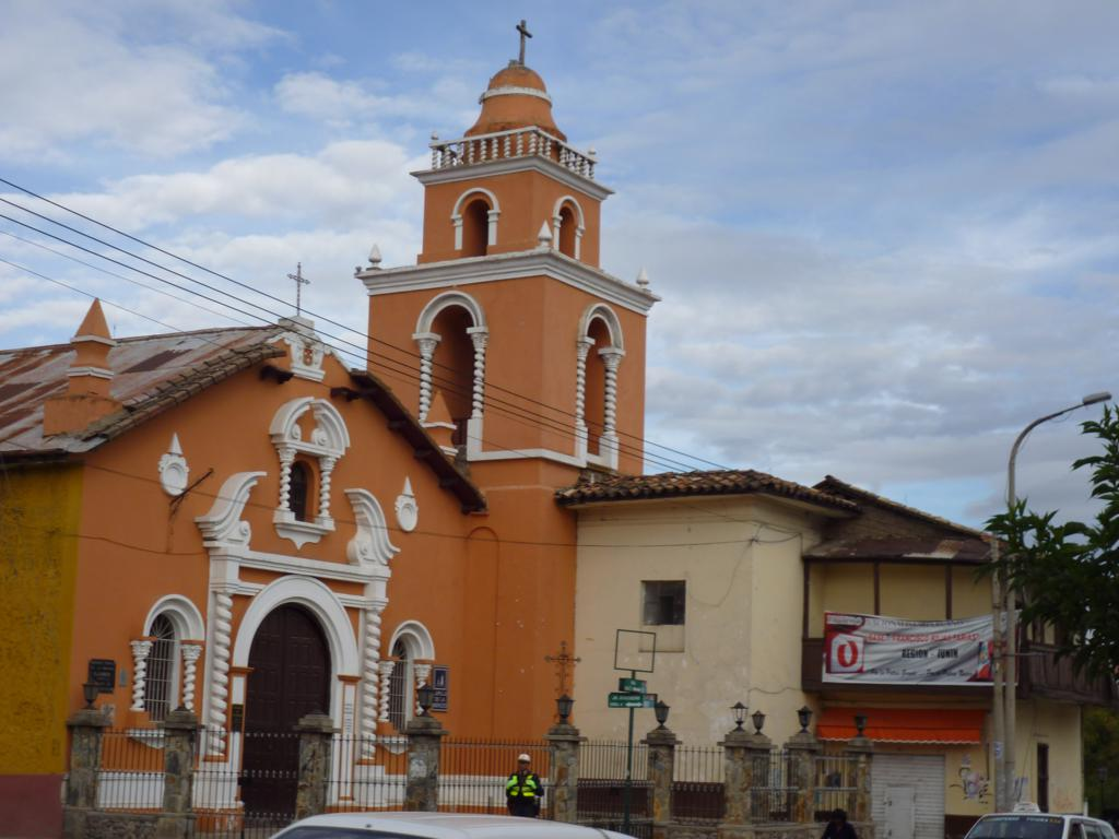 La Merced iglesia Huancayo, Peru por Richard Weiss